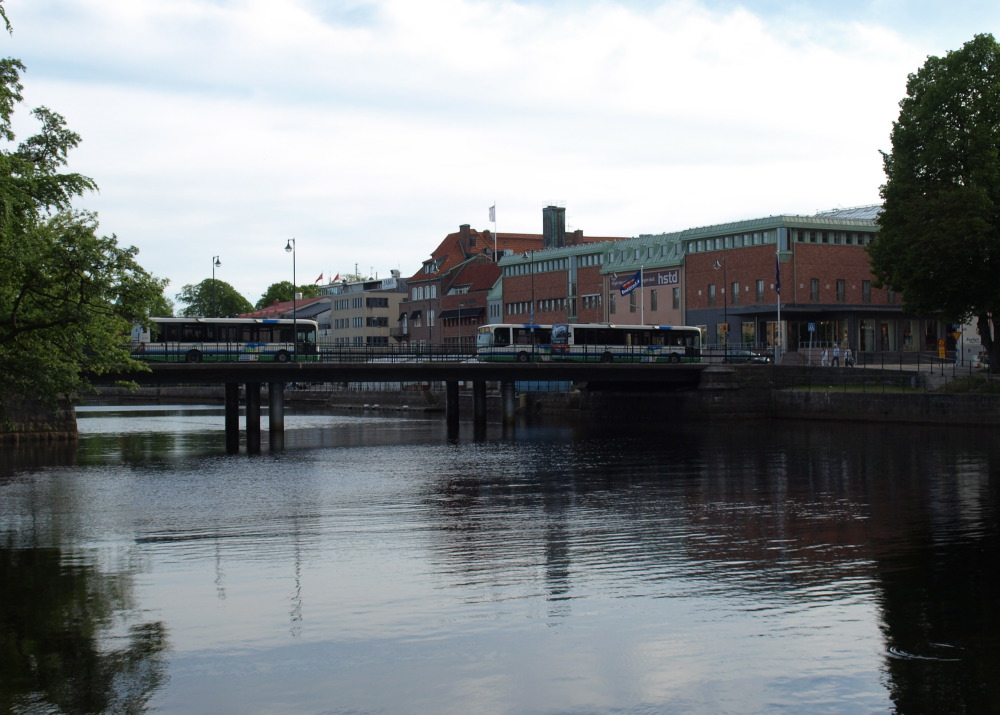 Bussar på Österbro i Halmstad.